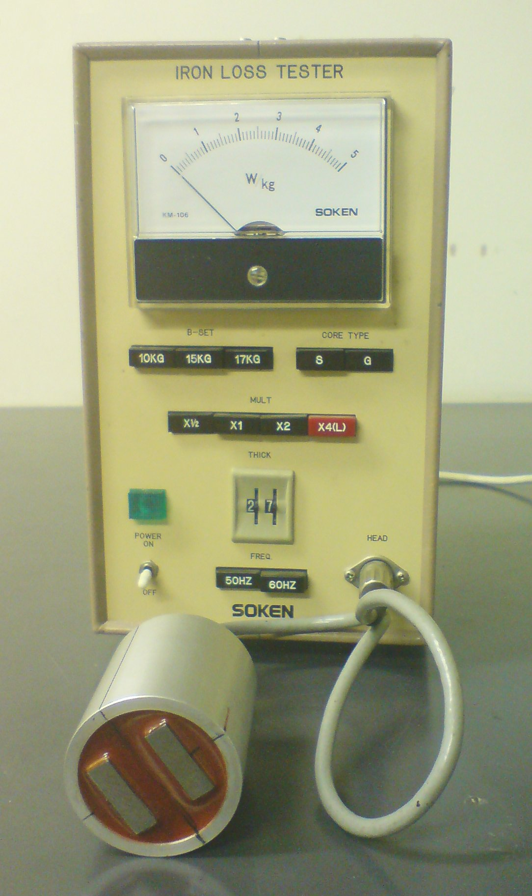 Soken tester